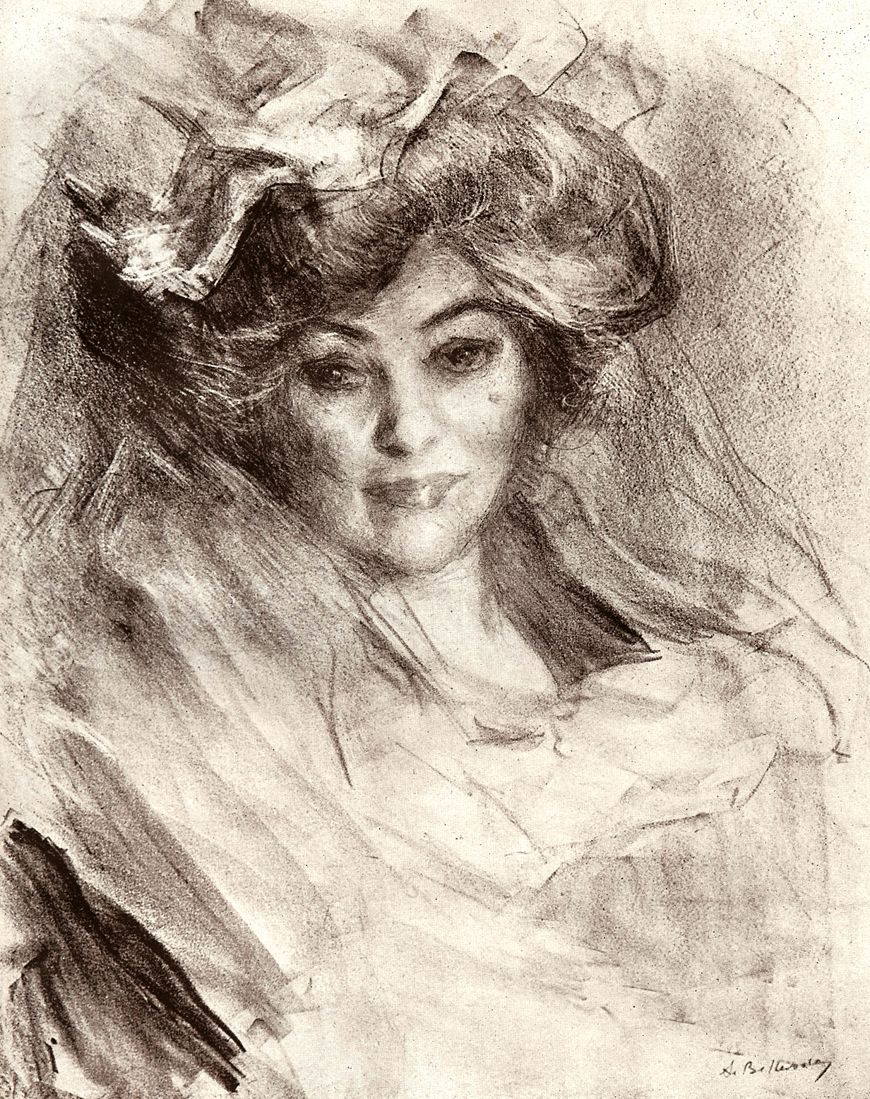 Lithographie de la mère de l'artiste, Mrs Milbank, par son fils, le peintre Albert de Belleroche (1894-1944), vers 1900.